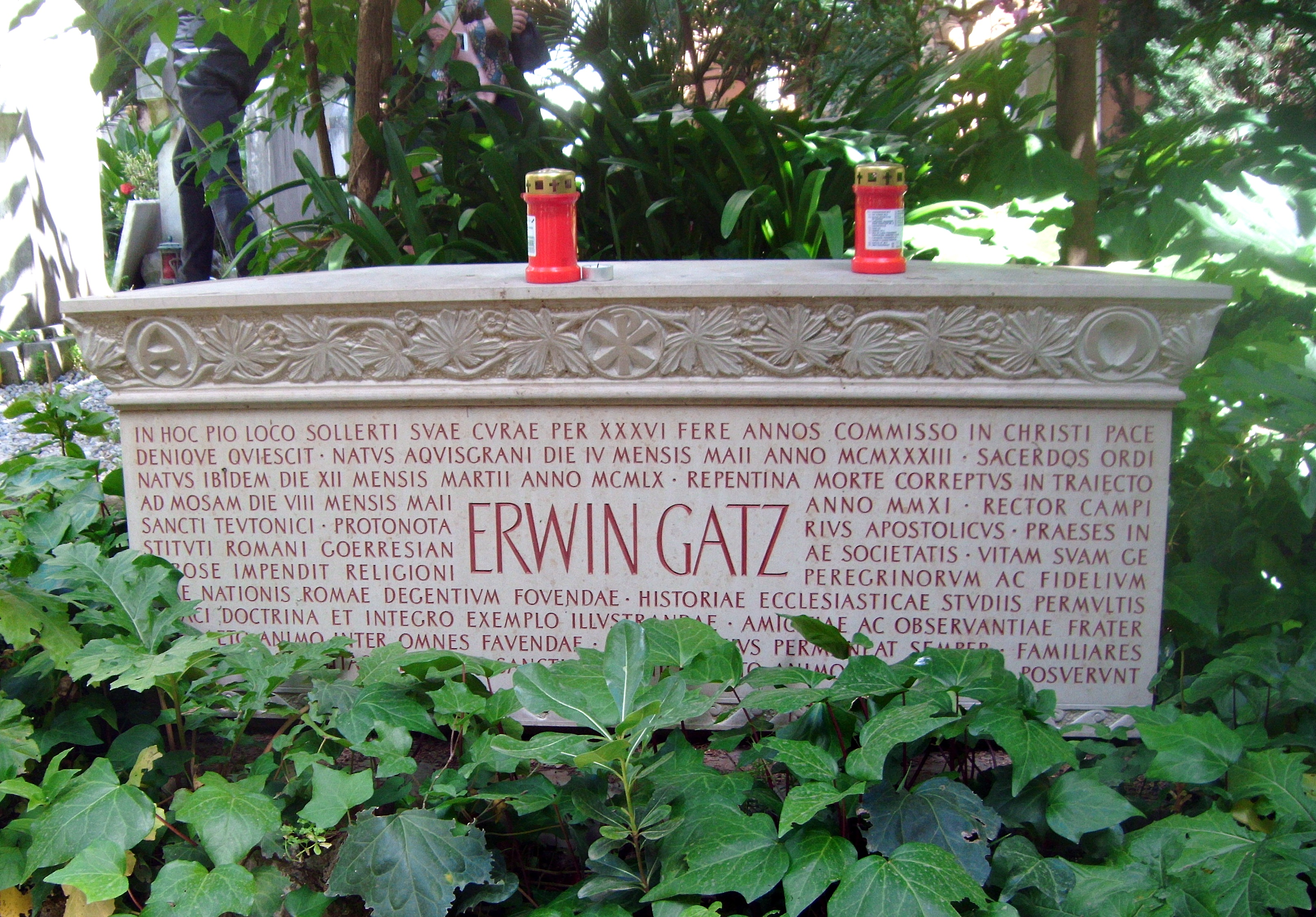 Grab des Kirchenhistorikers Erwin Gatz (1933-2011) auf dem Campo Santo Teutonico in Rom